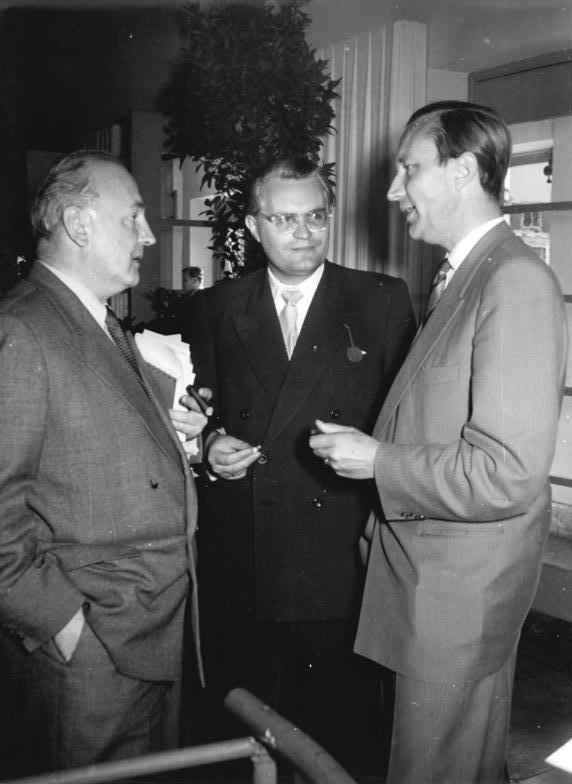 Zentralbild-TBD-Wlocka 2465 Zi-Ho. 6 Motive 24.9.1954 7. Parteitag der CDU in Weimar - 21. bis 25.9.1954 Der 2. Verhandlungstag des CDU-Parteitages am Donnerstag, den 23.9.1954 stand im Zeichen der Aussprachen. UBz: (v.l.n.r.) Der Vertreter der Frankfurter Allgemeinen Zeitung Dr. Dietrich im Gespräch mit dem Generalsekretär der CDU, Gerald Götting und Herrn Karlfranz Schmidt-Wittmack.